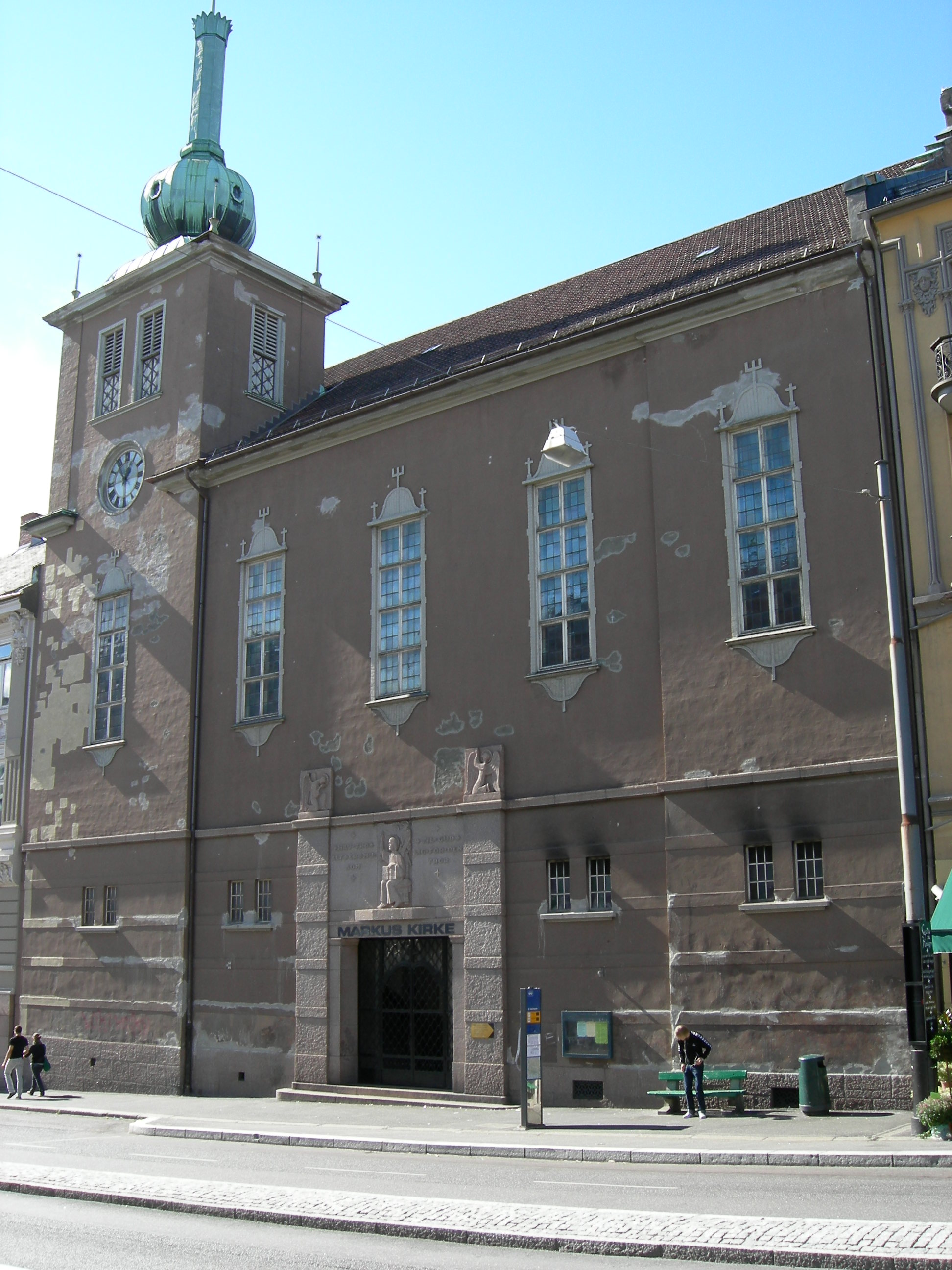 Markus church, St. Hanshaugen, Oslo, Norway